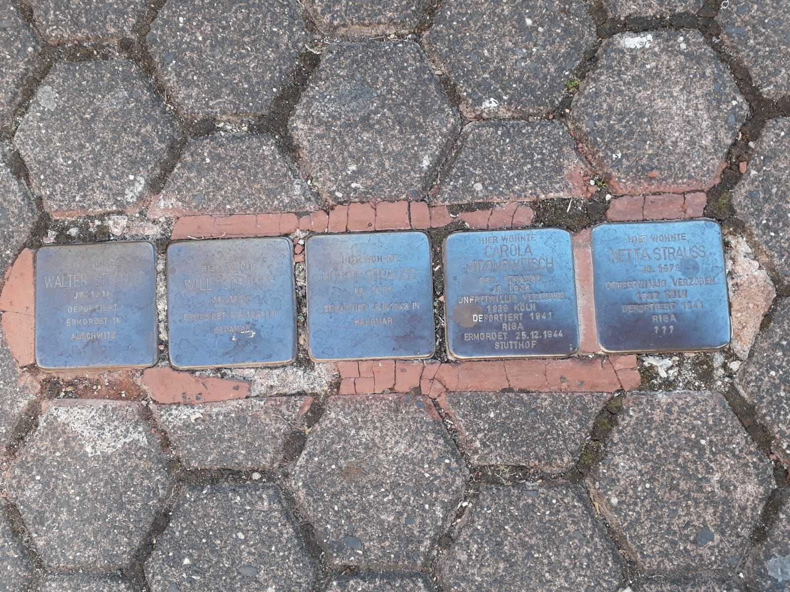 Friedrichstraße13